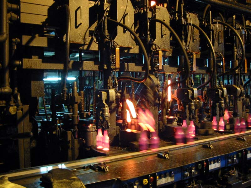 Individual Section machine, zu deutsch Maschine mit einzelnen Abschnitten, zur Herstellung von Hohlglas